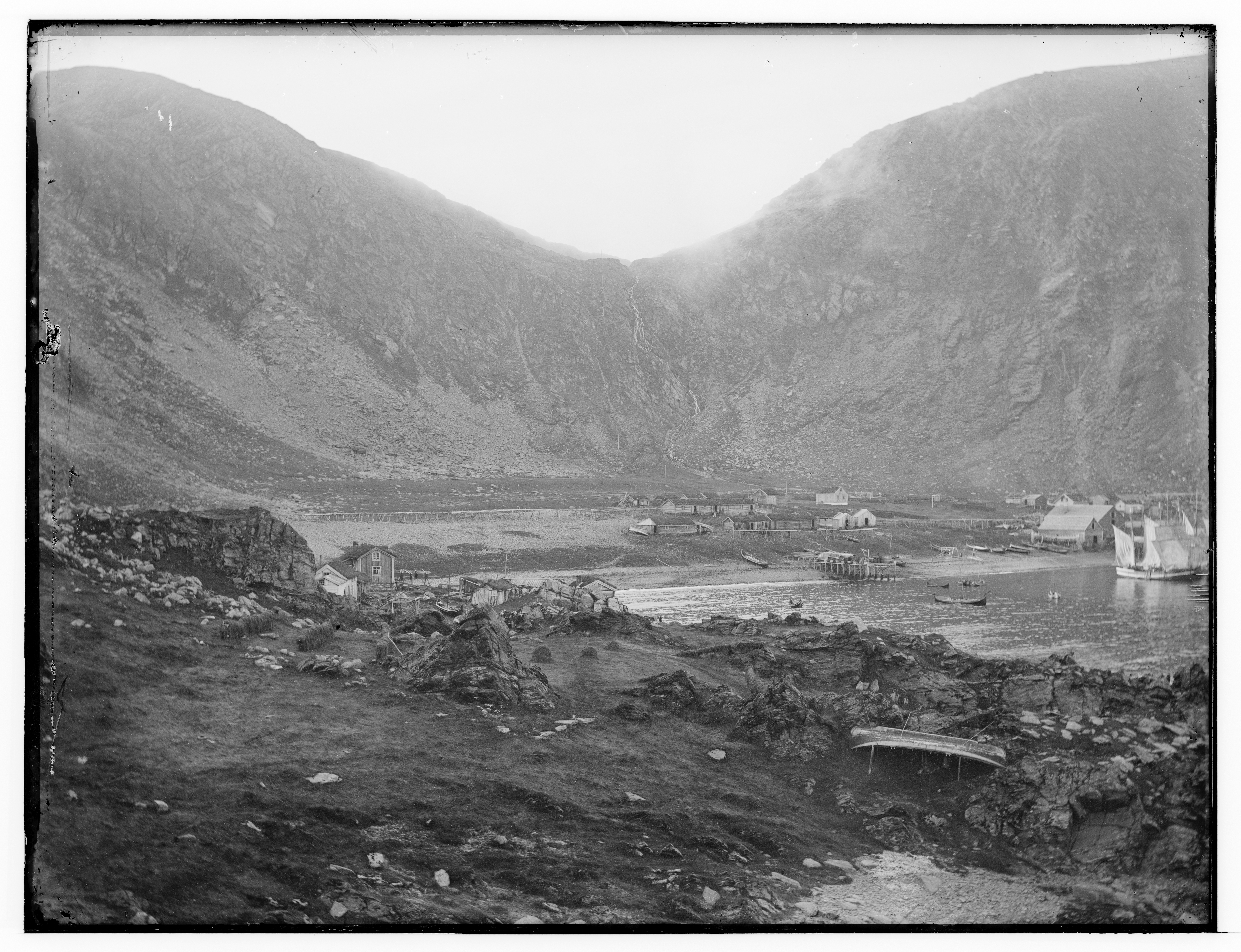 Bildet er hentet fra Arkivverket. Bilde oppover land, Kjelvik, Finnmarkens amt Arkivinstitusjon : Riksarkivet Arkivnavn : Havnedirektoratet Sted : Norge, , , Emneord: Havn, Fjell, Sjø, Bebyggelse, Båter Avbildet